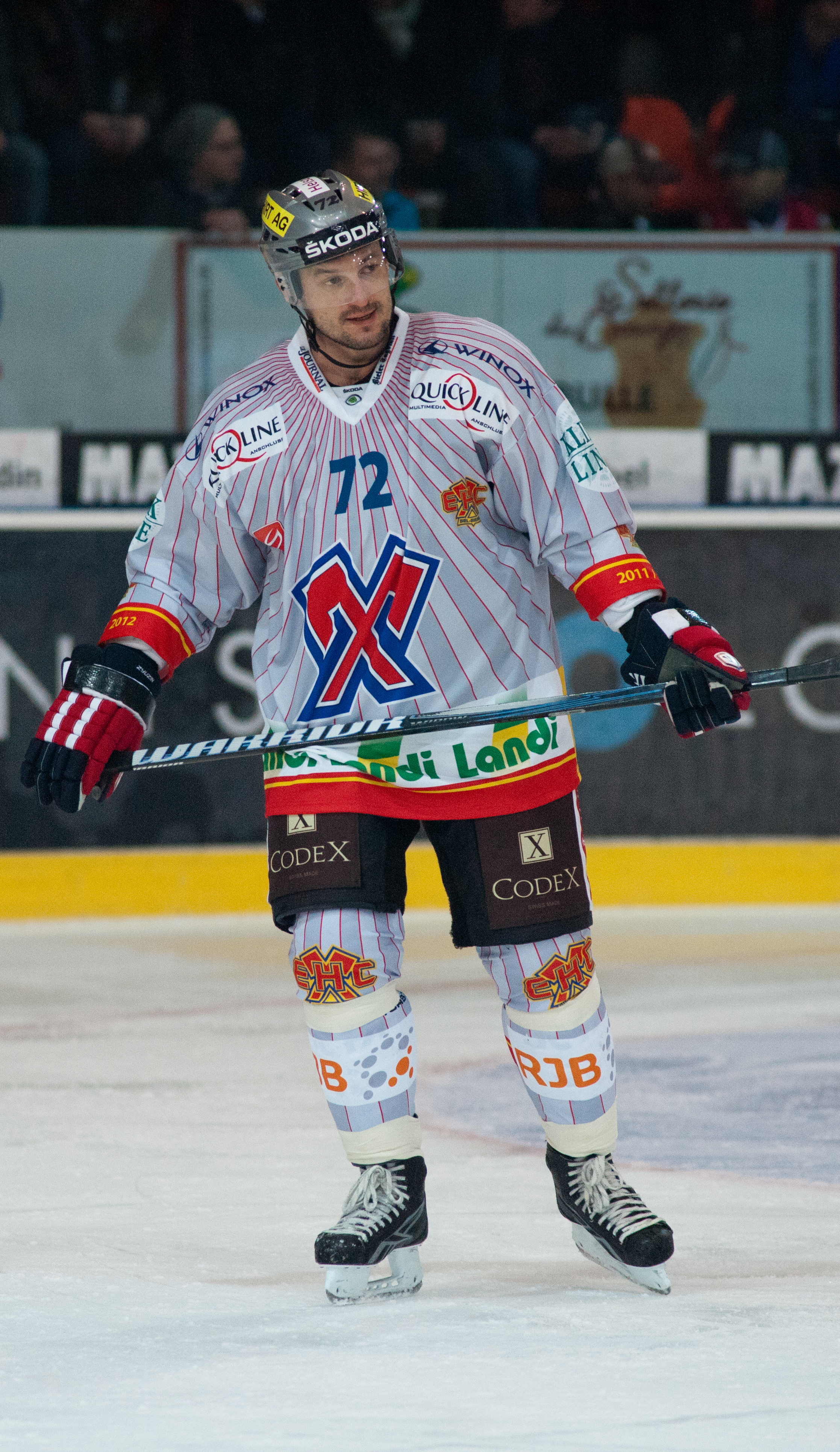 Fribourg-Gotteron vs. HC Bienne, 25.11.2011